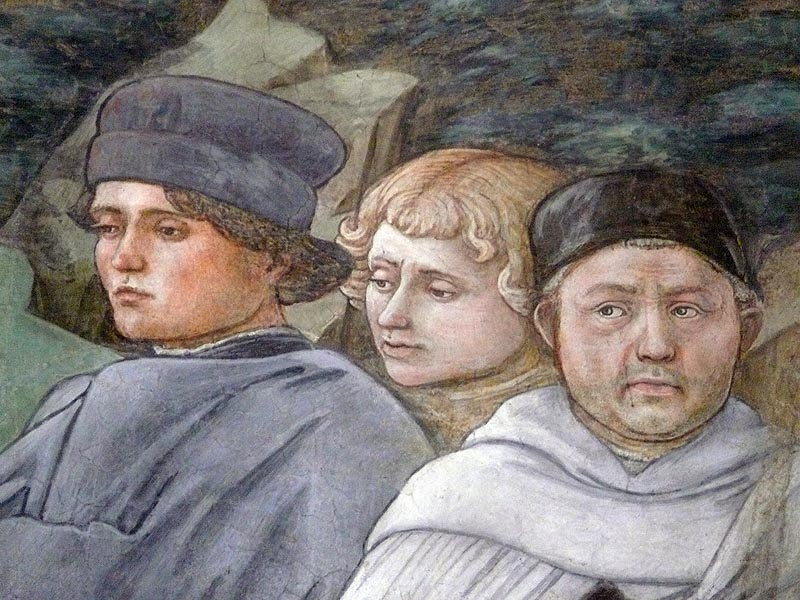 detail: Lippi and pupils Fra Diamante and Pier Matteo d'Amelia